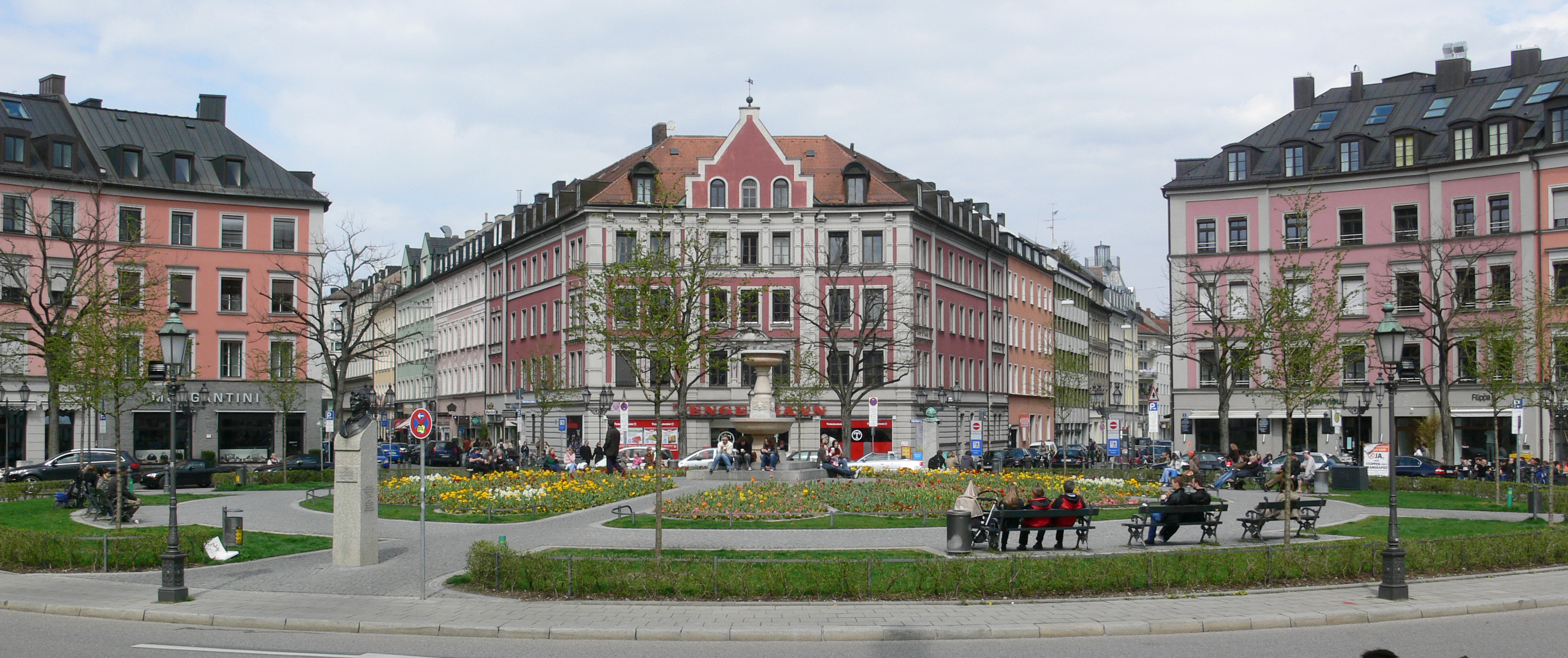 München, Gärtnerplatz, Ansicht von den Stufen des Gärtnerplatztheaters in Richtung Innenstadt (Mitte: Tengelmann-Filiale, links vorner: Leo-von-Klenze-Denkmal)